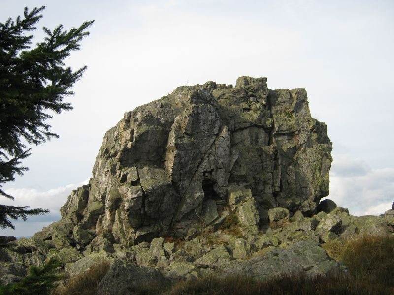 Hanskühneburgklippe, Auf dem Acker, Nationalpark Harz